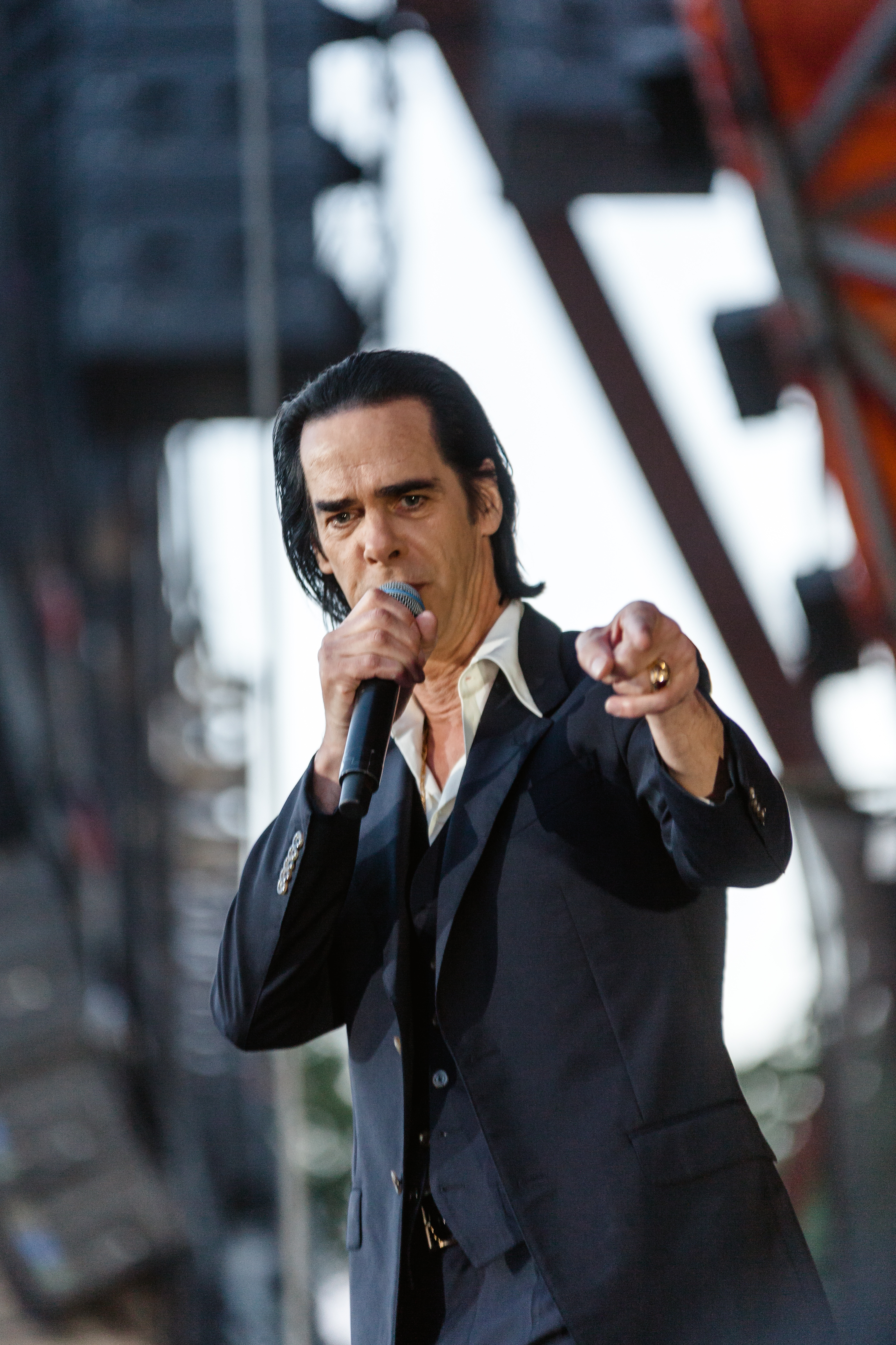 Festivalsommer This photo was created with the support of donations to Wikimedia Deutschland in the context of the CPB project "Festival Summer".